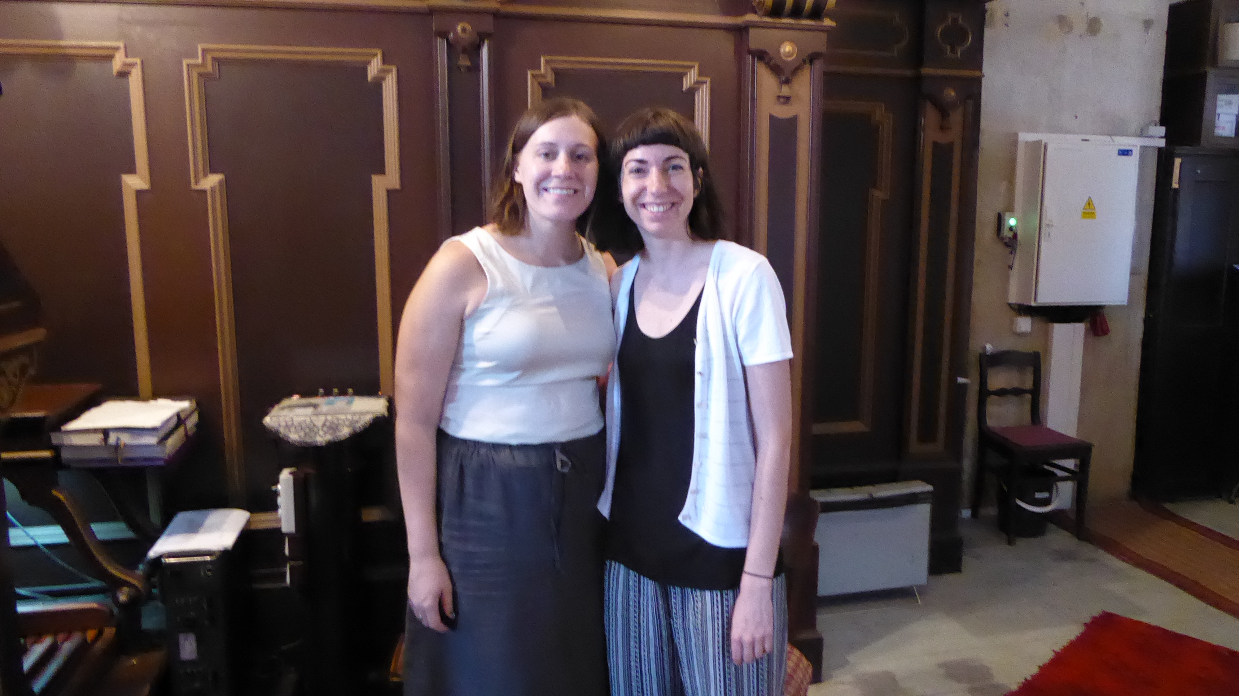 Vzácná návštěva z centra wikipedie v USA